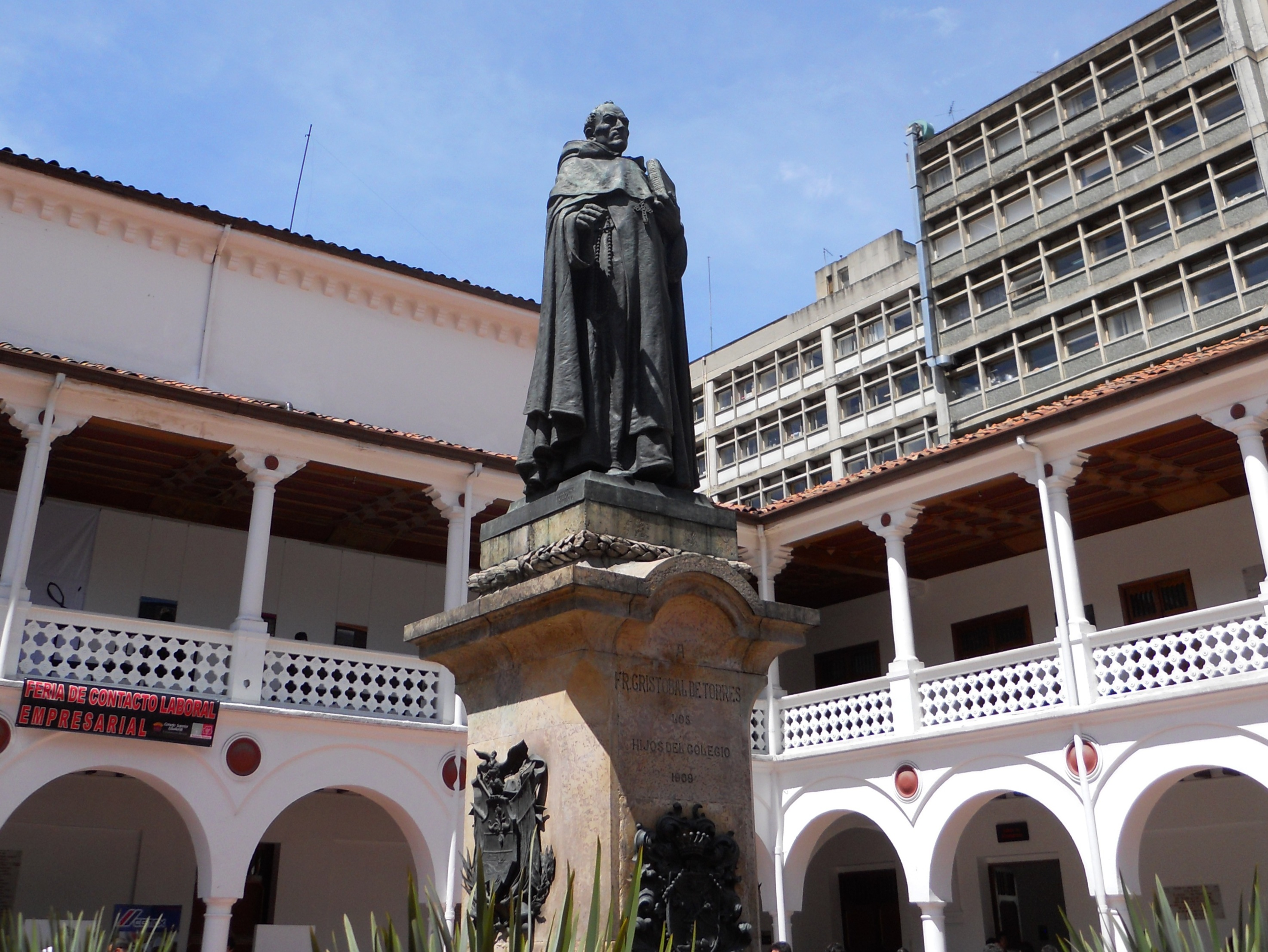 Escultura de fray Cristóbal de Torres en el claustro de la Universidad del Rosario en Bogotá.